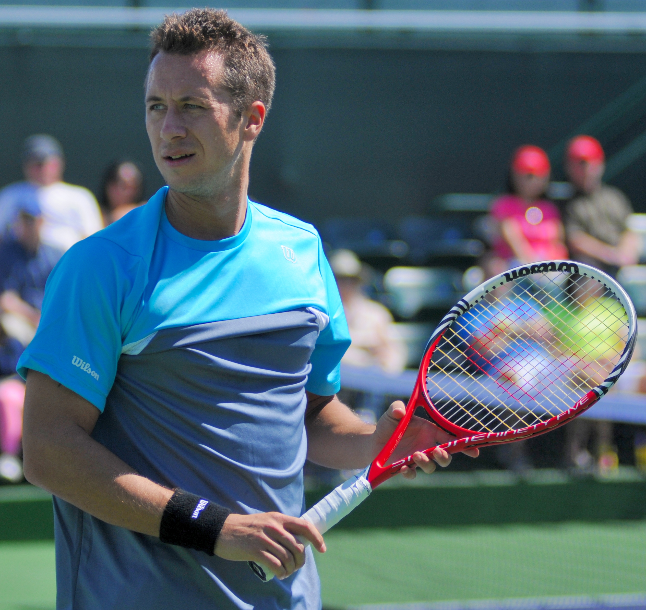 2013 BNP Paribas Open